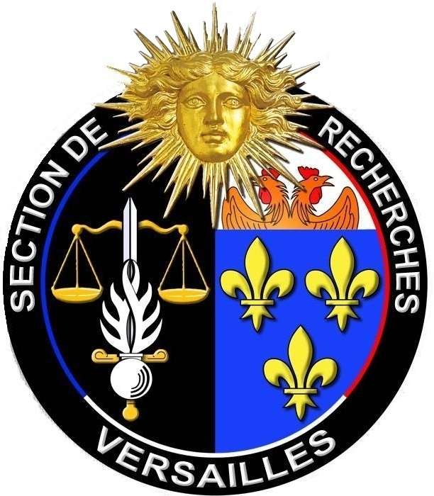 logo Section Recherches Versailles